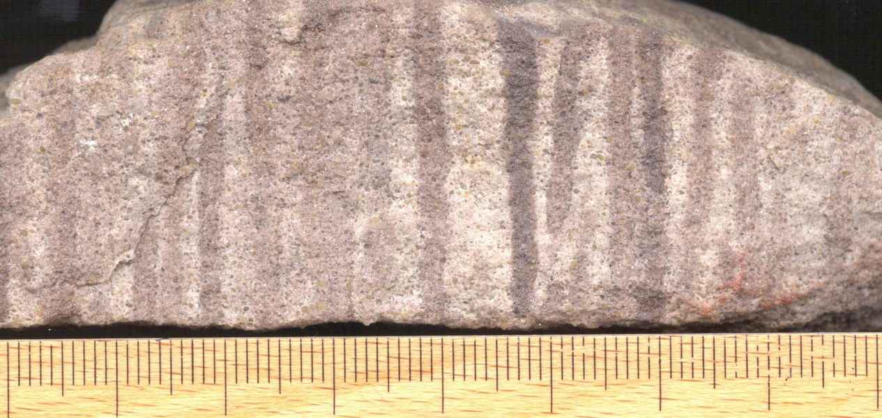 Mittelkörniger Sandstein. Die roten Streifen sind senkrecht zur eigentlichen Schichtung verlaufende Grabröhren von Würmern (sogenannter Skolithen-Sandstein). Geschiebe, Insel Poel